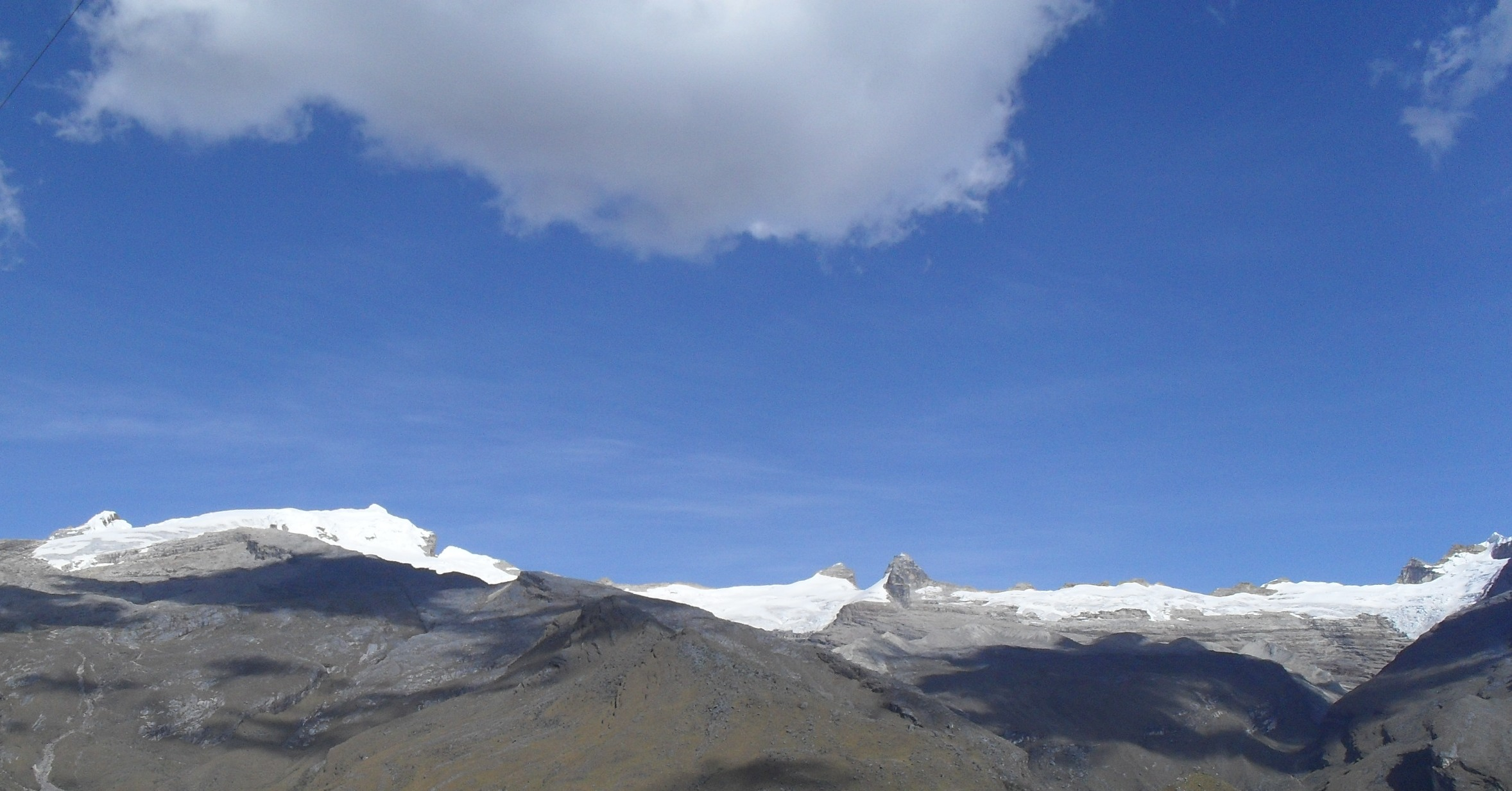 Picos de la sierra nevada del Cocuy Guicán, Boyaca Colombia, a la izquierda el pico ritacuba blanco